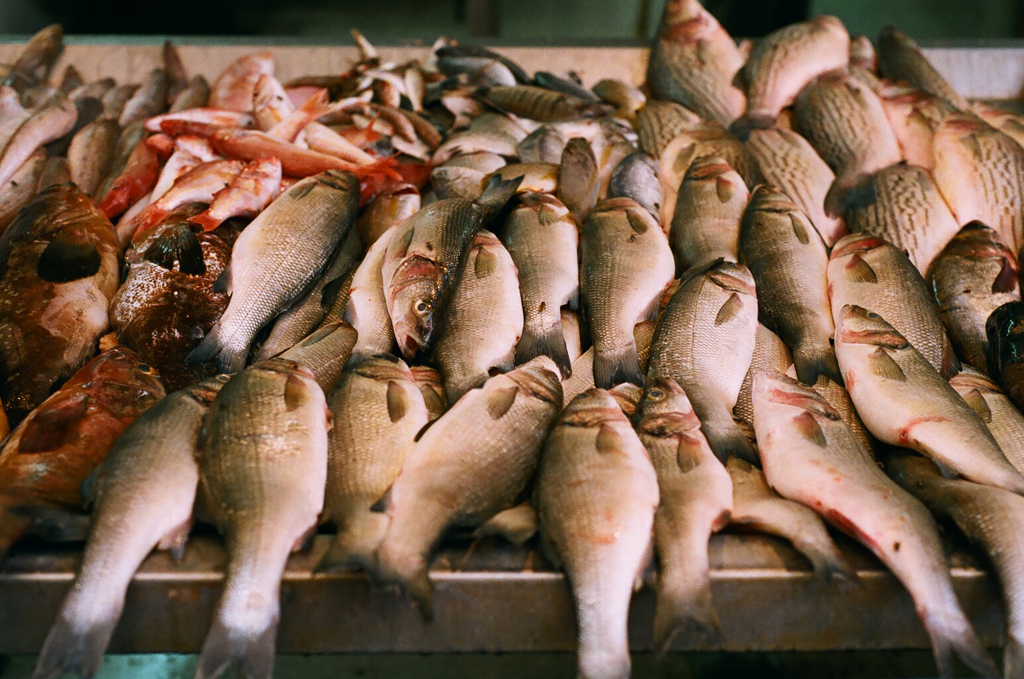 Nāhuatl: Michin.Ako - June.05